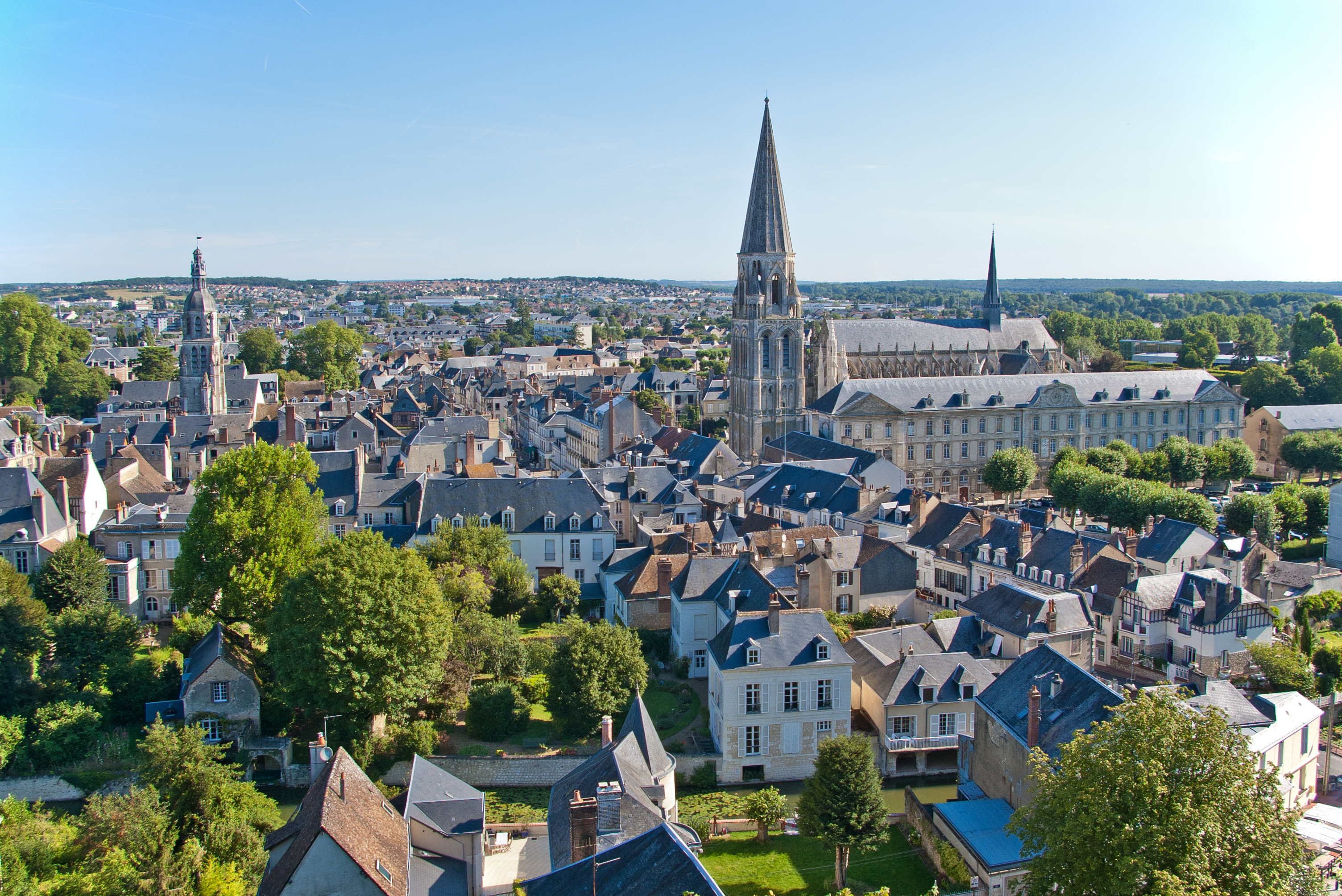 Vue générale du centre de Vendôme. A gauche la Tour Saint-Martin et à droite, l'Abbaye de la Trinité. Overview of the center of Vendôme. Left the Tour Saint-Martin and right, the Abbey of the Trinity.